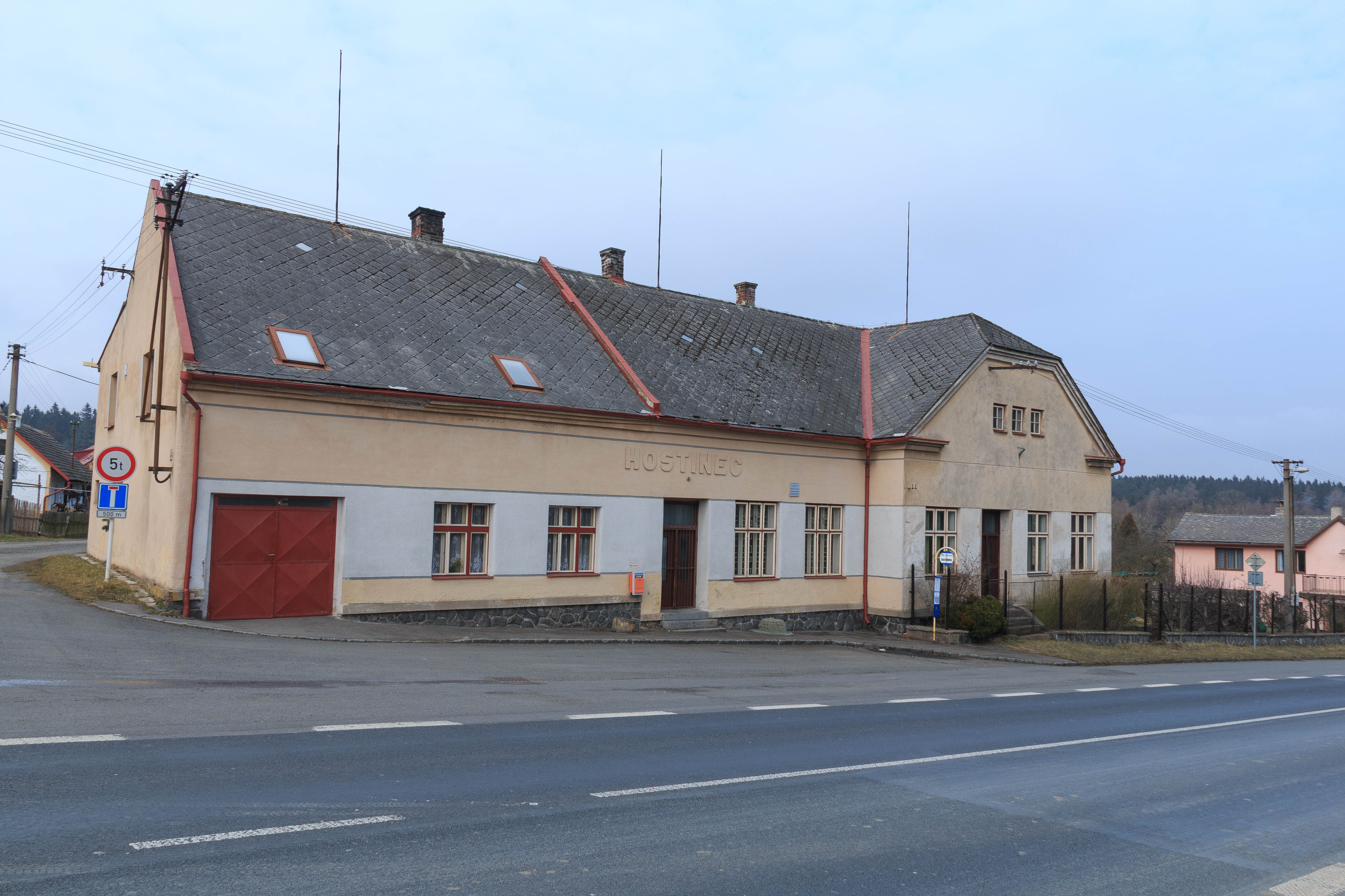 Nová Ves bývalá hospoda